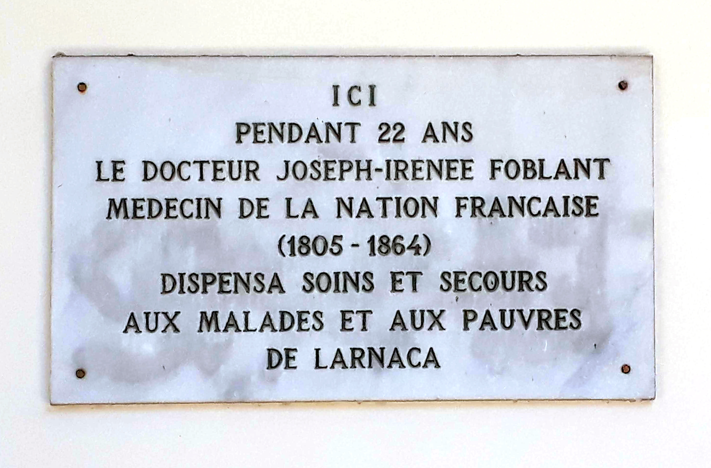 Gedenktafel an Joseph-Irenee Foblant Memorial an der St. Josefs-Kirche in Larnaca